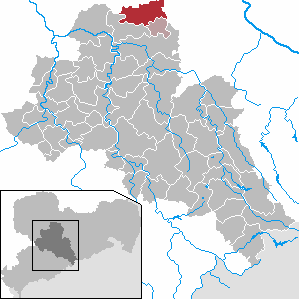 Ostrau in Saxony - district Mittelsachsen